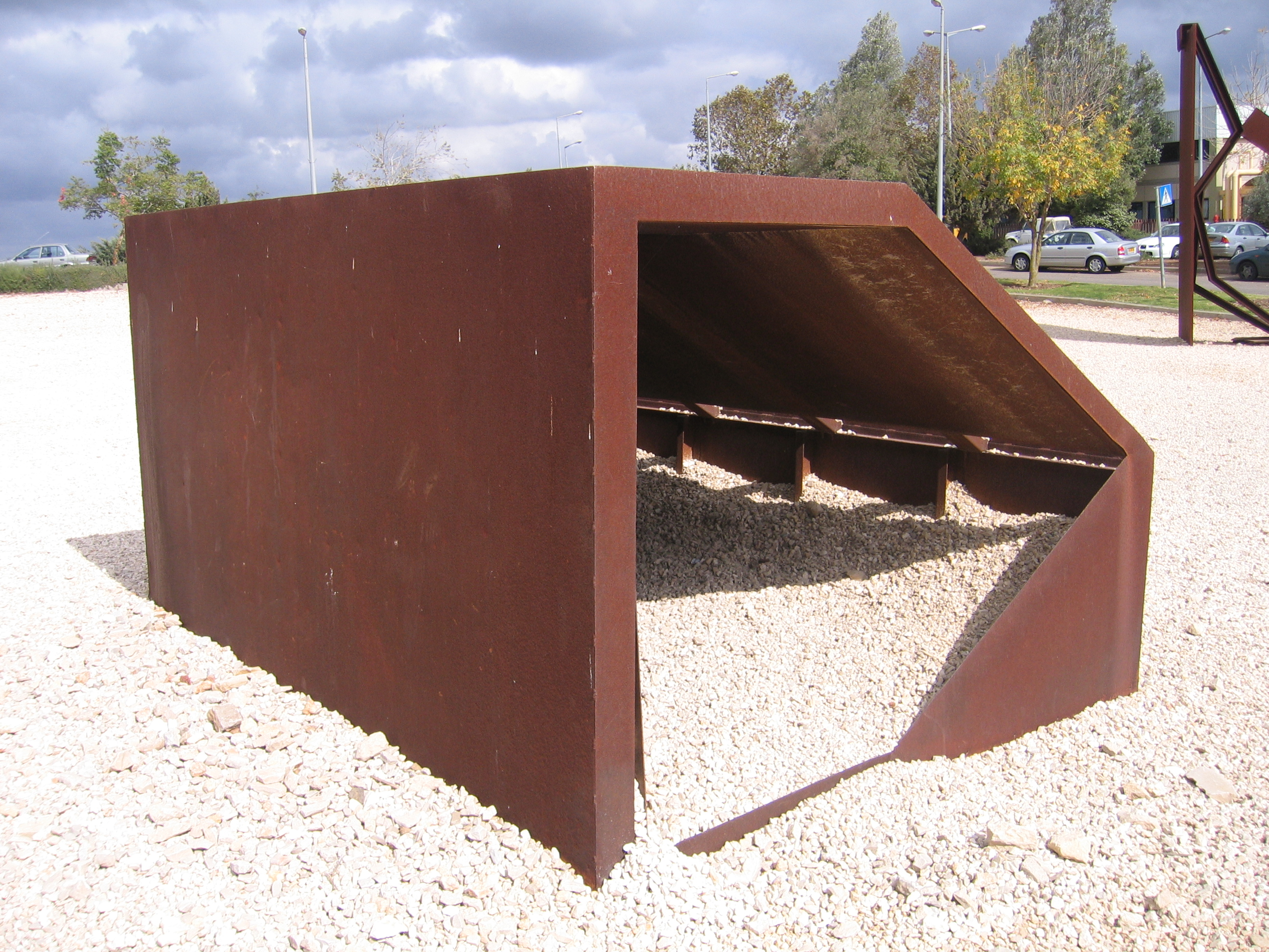 Sculpture